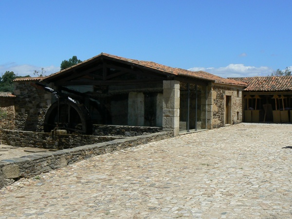 Lagar Hídrico em Proença-a-Velha